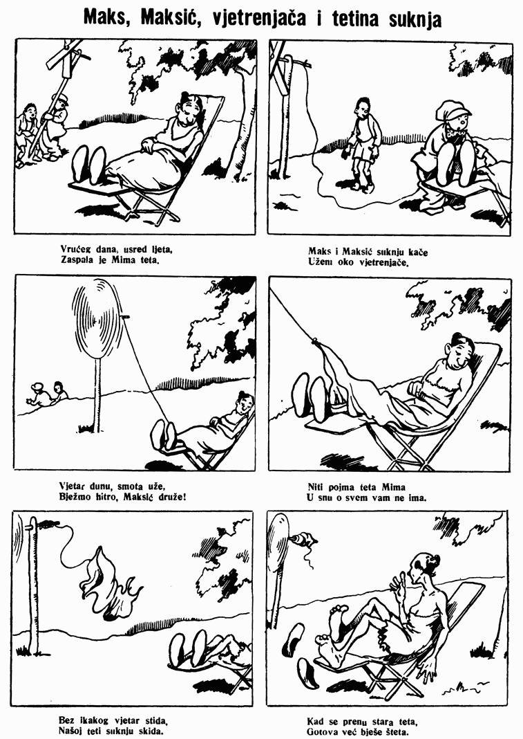 Strip Maks i Maksić Sergeja Mironoviča Golovčenka